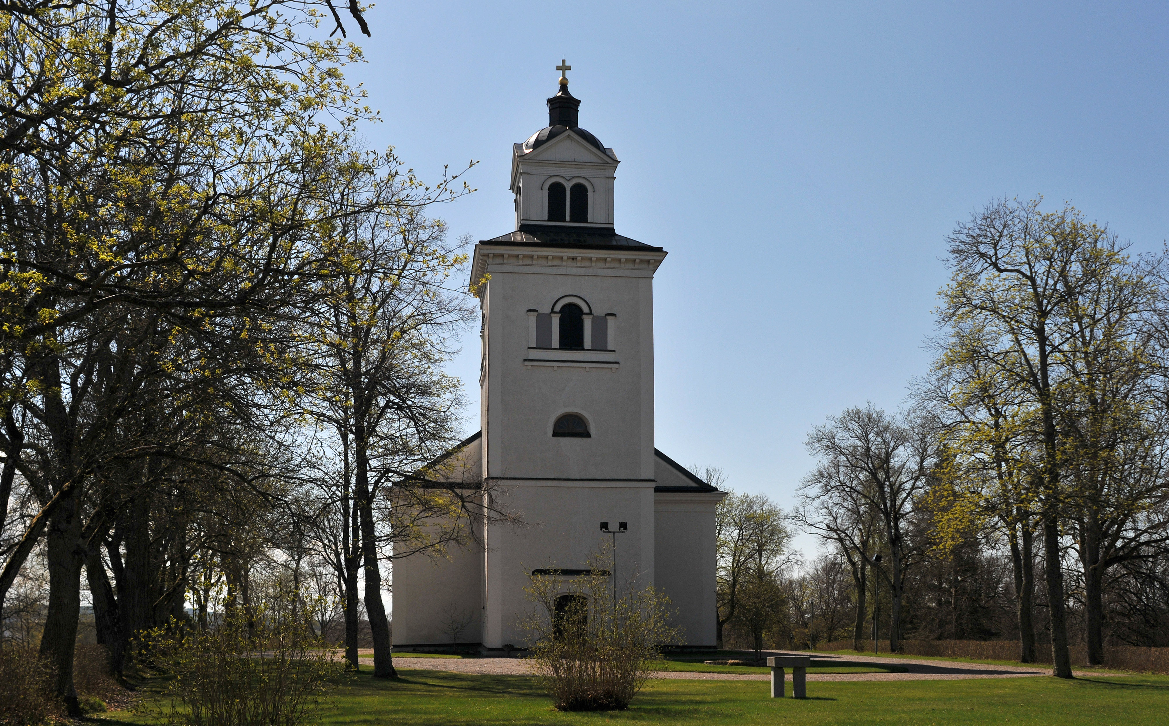 Hammars kyrka i Hammar, Askersunds kommun, Närke.